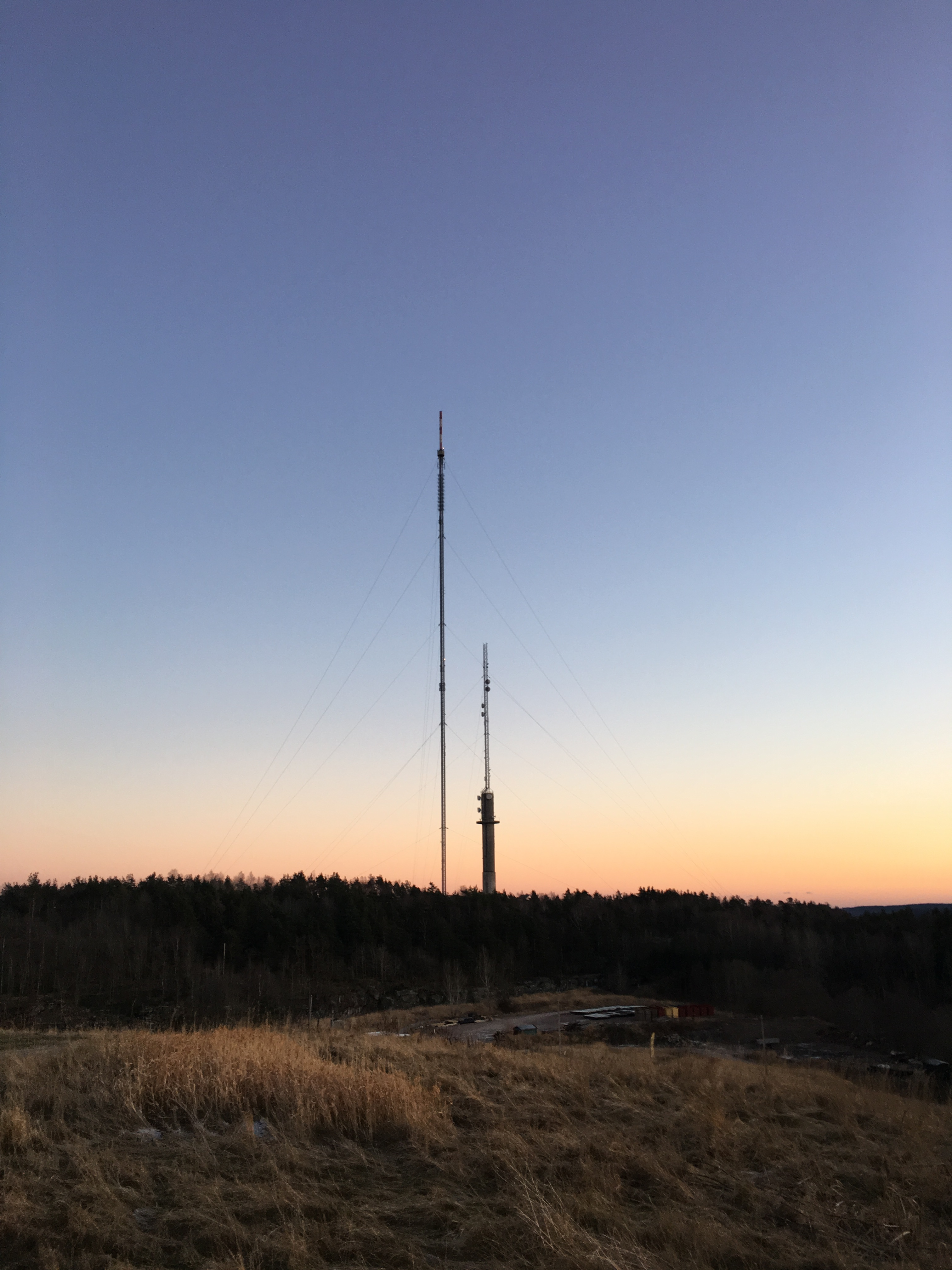 Brudaremossemasten sedd från Brudarebacken.